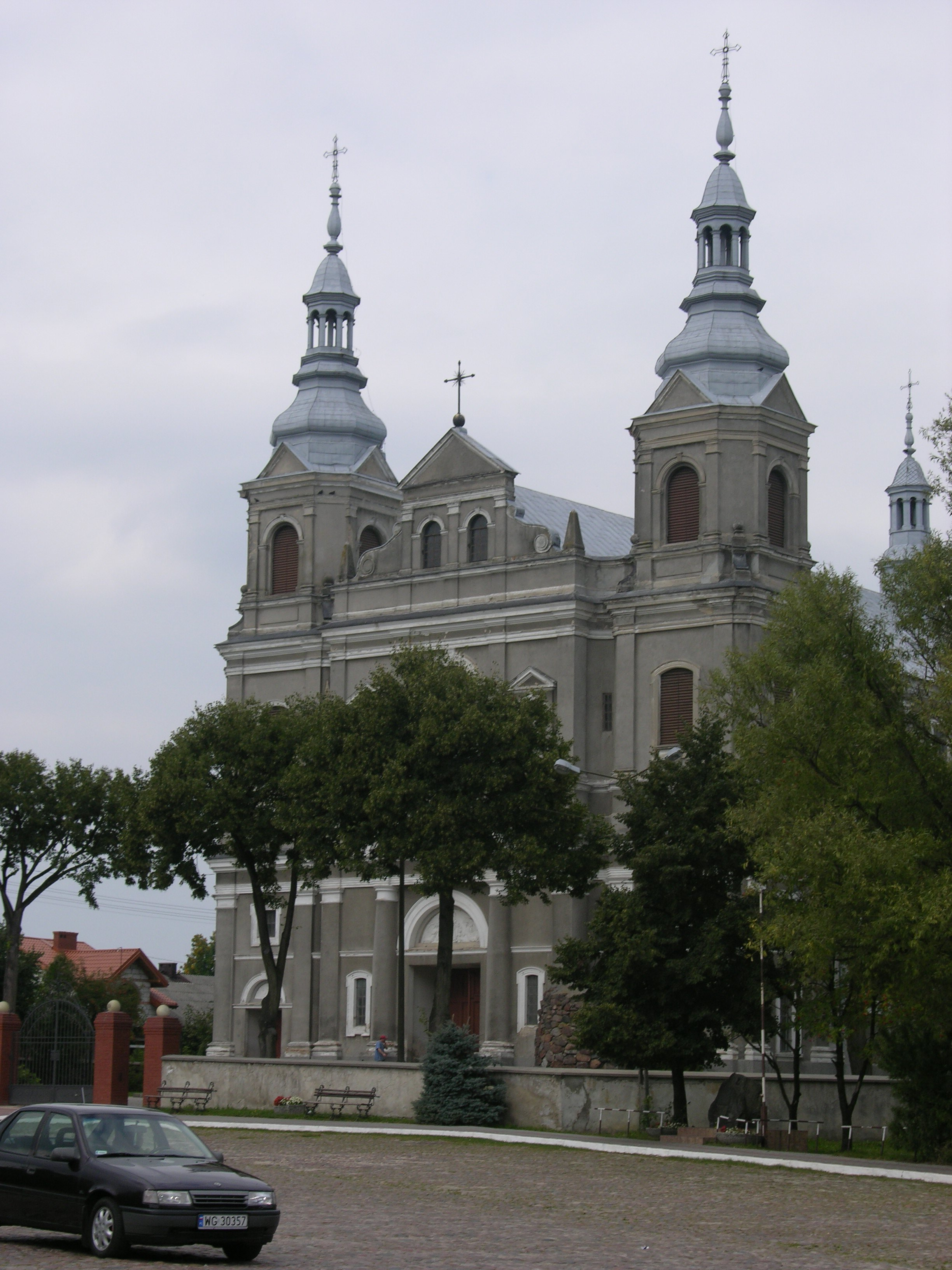 Parysów - kościół parafialny pw. Wniebowzięcia NMP (zabytek